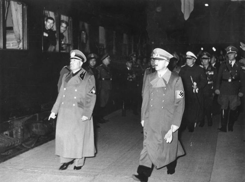 Scherl: Die Abreise des Duce von München Nach dem erfolgreichen Abschluss der Münchener Besprechungen verliess der italienische Regierungschef Benito Mussolini im Sonderzug die Hauptstadt der Bewegung. UBz: den Duce und den Führer, der den italienischen Regierungschef zum Bahnhof begleitet hatte, auf dem Bahnsteig, weiter rückwärts erkennen wir Generalfeldmarschall Hermann Göring. 29.9.1938